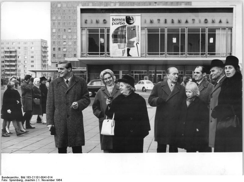 Zentralbild Spremberg 1.11.1964 Vertrag zum Passierscheinabkommen 1964 Die Hauptstadt hat sich verändert Das war die Meinung von Anni und Victor Michalski (im Bild rechts) aus dem Westberliner Bezirk Wedding, die am Nachmittag des 1. November 1964 mit ihren Verwandten Marta und Willy Fornfett (sie wohnen Straußberger Platz 19) einen Bummel durch die Karl-Marx-Allee unternahmen. Bei diesem Spaziergang waren auch die Kinder, der Schwiegersohn und das Enkel der Familie Fornfett dabei. (von links nach rechts: Gerd Fornfett, Hella Wicke, Marta Fornfett, Willy Fornfett, Barbara Wicke, Gerhard Wicke und Victor und Anni Michalski. Das Ehepaar wohnt im Stadtbezirk Lichtenberg).